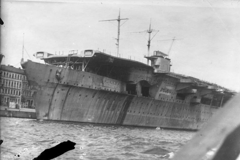 Graf Zeppelin. Flugzeugträger. Stapell.: 8.12.1938 B 676 (R IX E 7845)